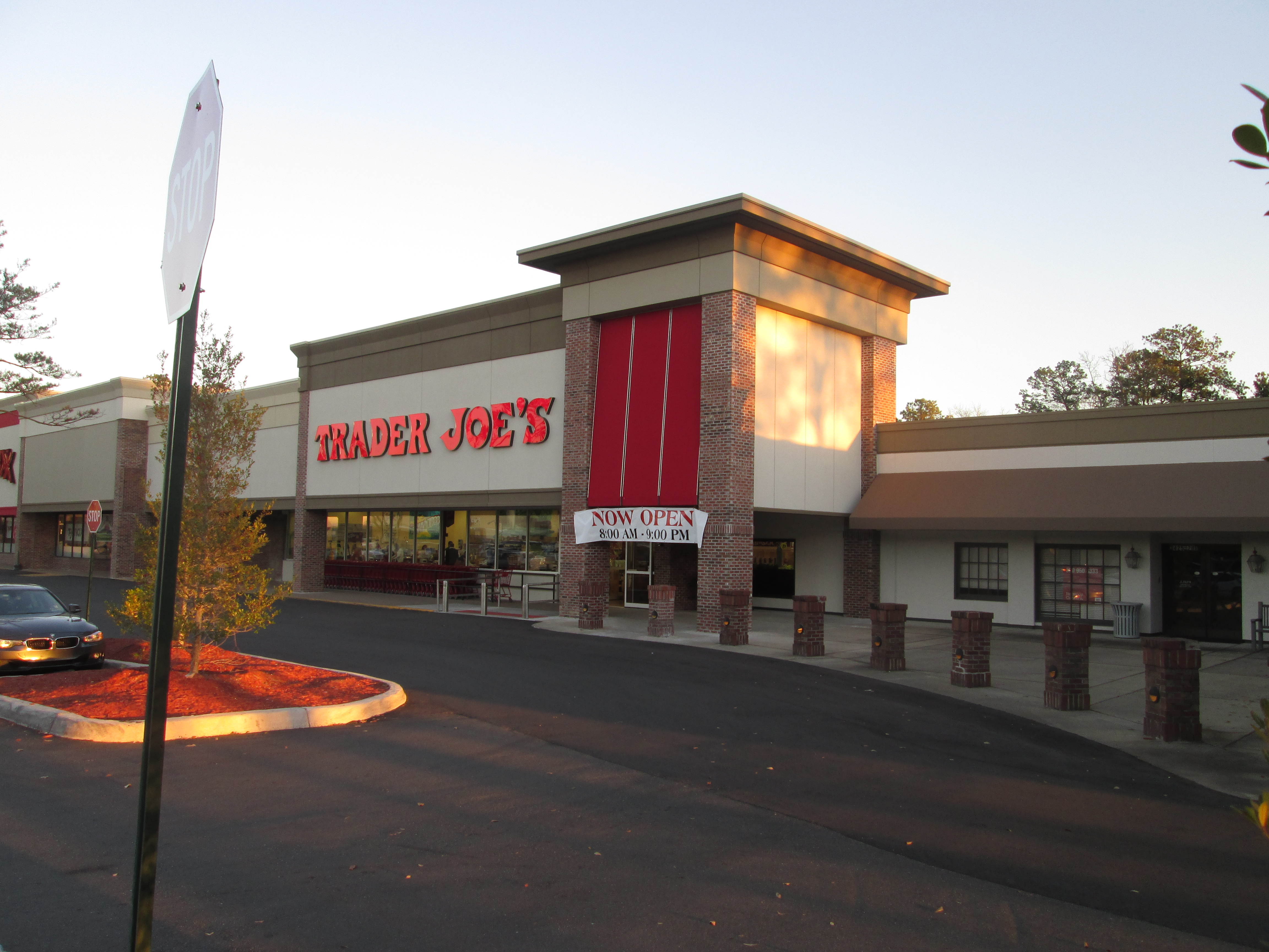 Tallahassee, Florida. Near I-10 & Thomasville Road.